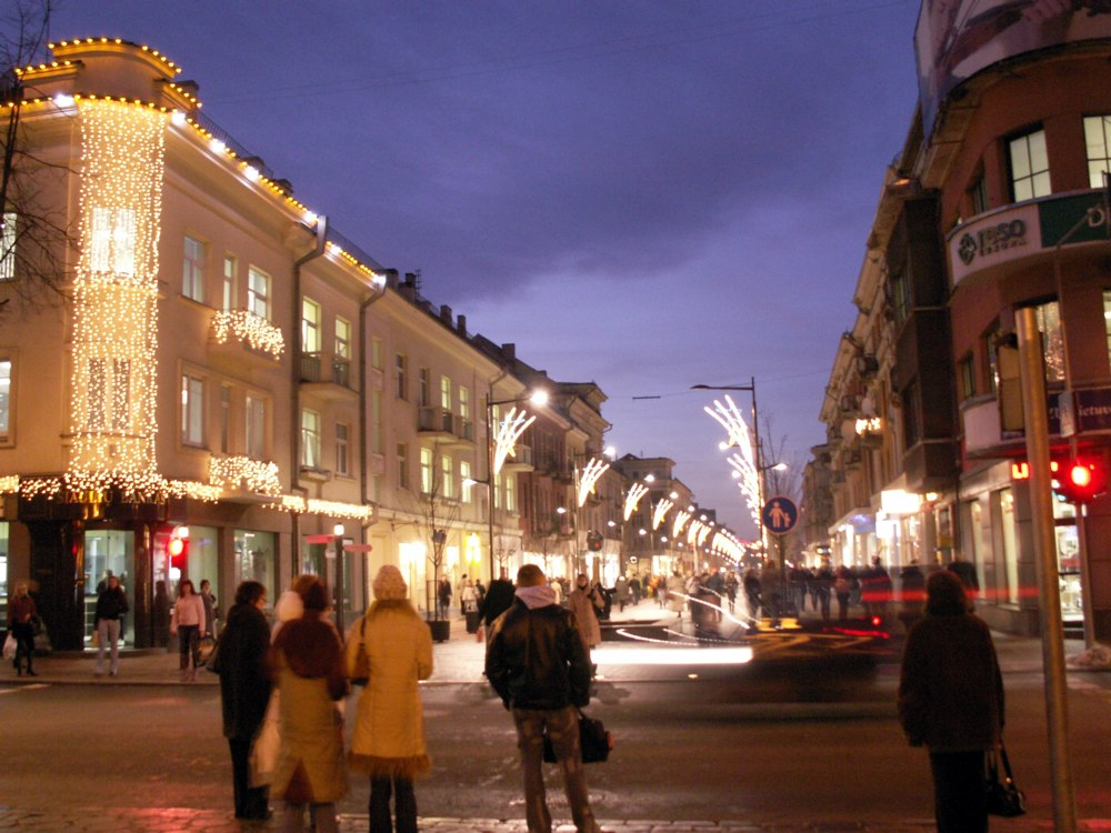 Šiaulių Vilniaus gatvė naktį